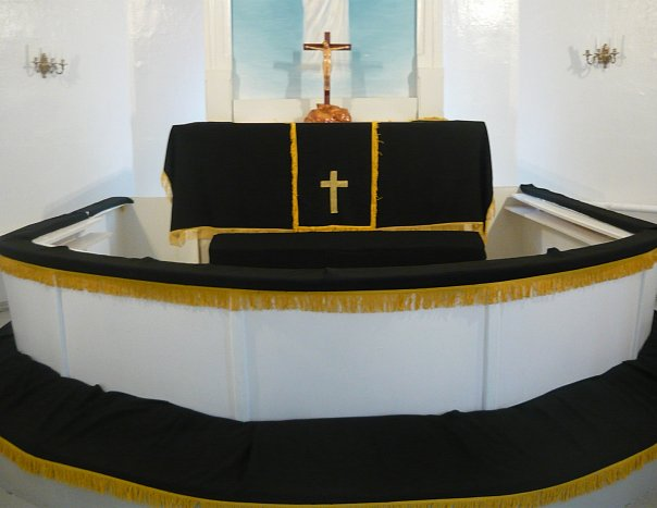 black altar for Great Friday - Day of Jesus Crucifiction in Church of Ingria